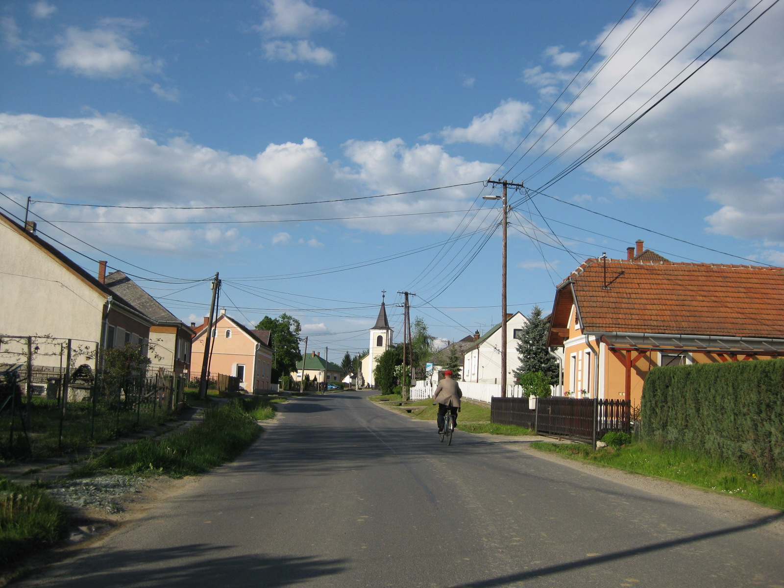 Rábatótfalu - Szentgotthárd része